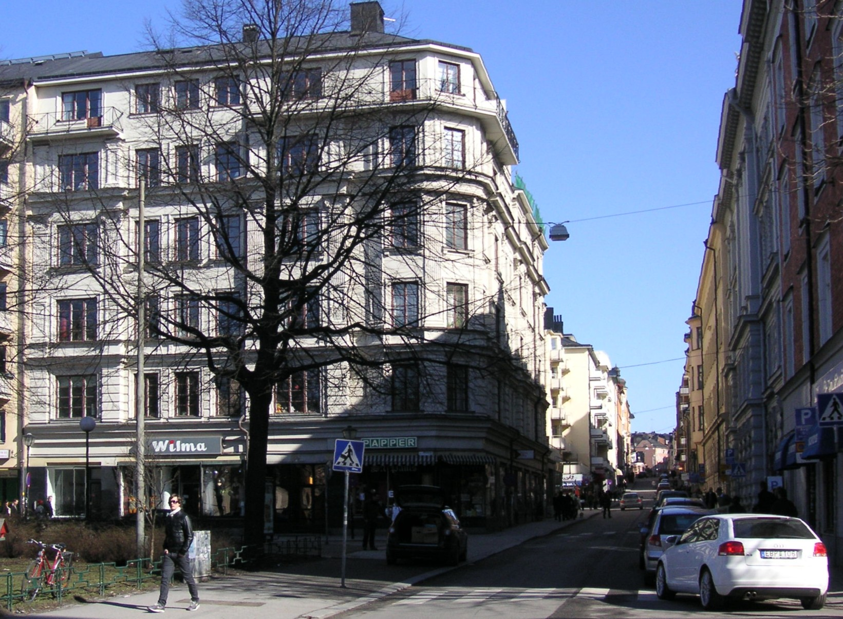 S:t Paulsgatan på Södermalm i Stockholm